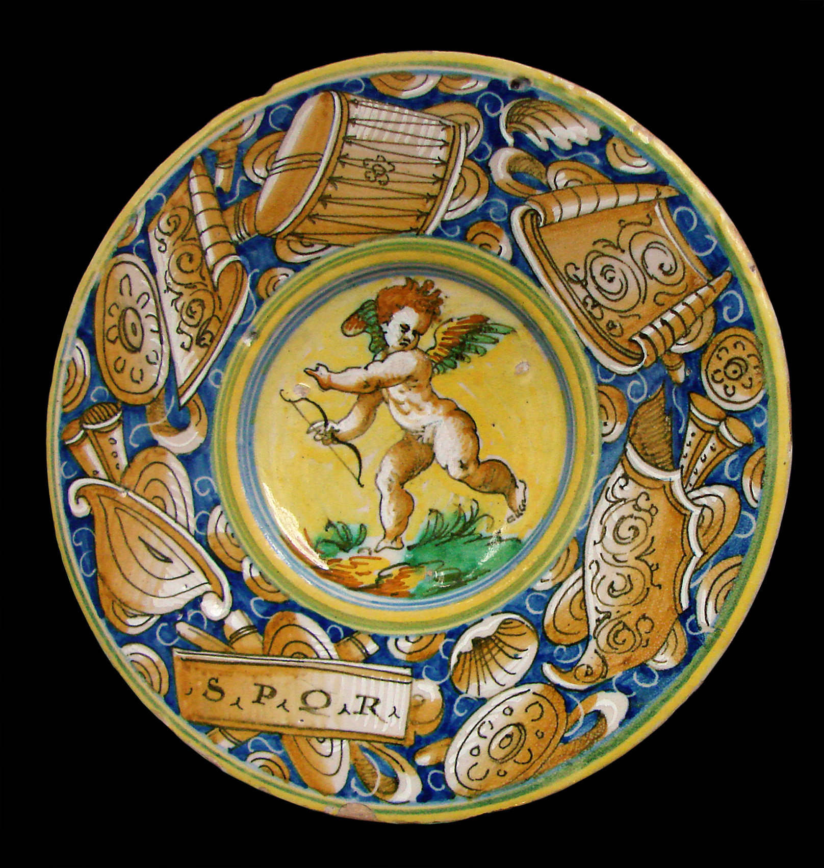 Assiette à bord uni, décor à grand feu, Castel Durante, Italie, vers 1550-1570 . Musée des Beaux-Arts de Lille.